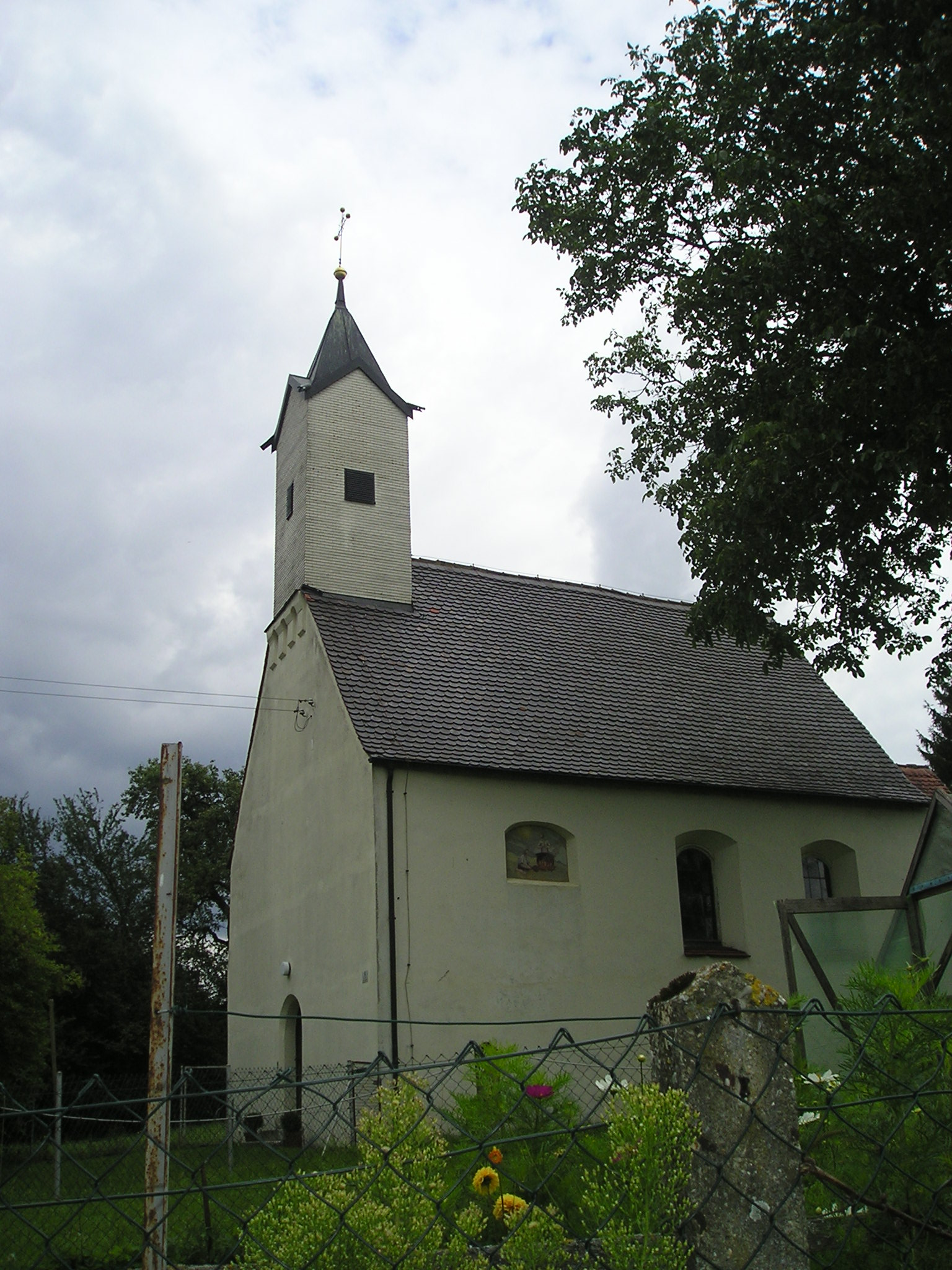 Treidelheim, Ortsteil von Rennertshofen im Landkreis Neuburg-Schrobenhausen, katholische Filialkirche St. Vitus